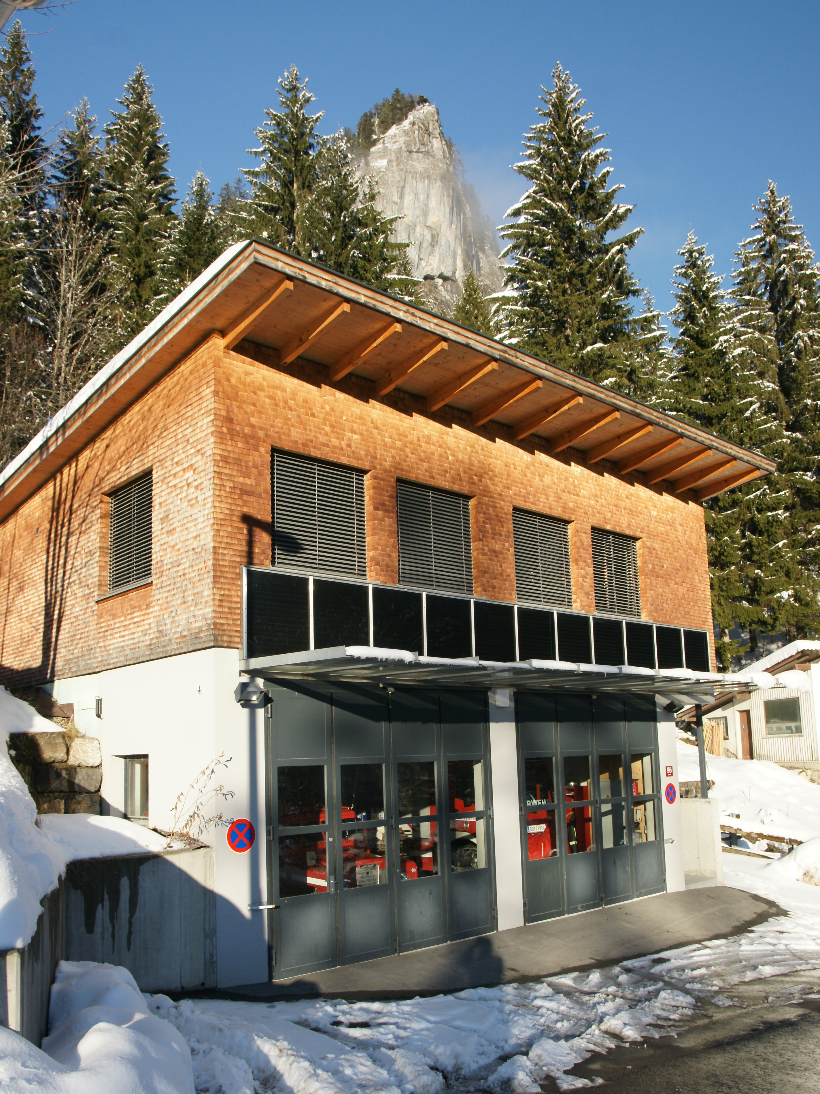 Ebniter Feuerwehrhaus.